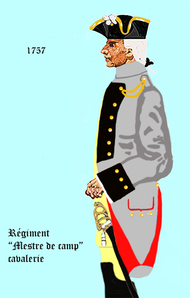 Uniform eines französischen Kavallerie-Regiments gemäß Verordnung von 1757